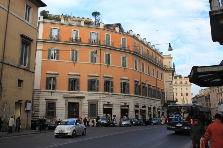 Transporte en Roma - Italia. Corso Vittorio Emanuele II, 71